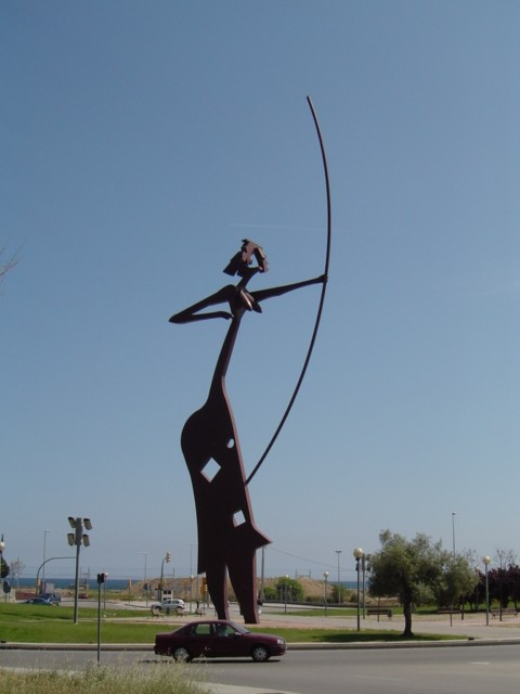 Monumento a la arquera laietana. Fotografía tomada por Georgina Cabrera